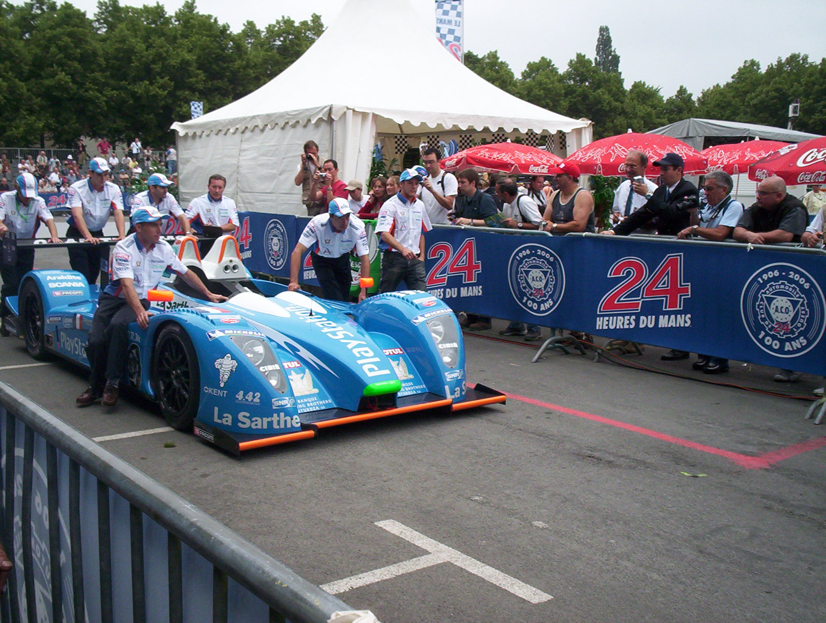 La voiture de la team Pescarolo aux 24 heures du Mans 2007